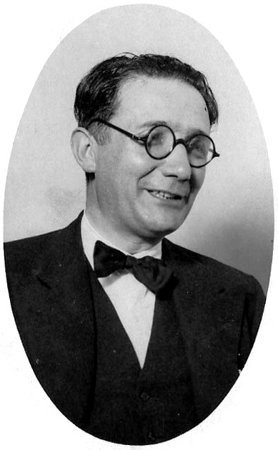 Otro nuevo académico. El ilustre artista Castelao que hoy ingresará en la Academia Gallega